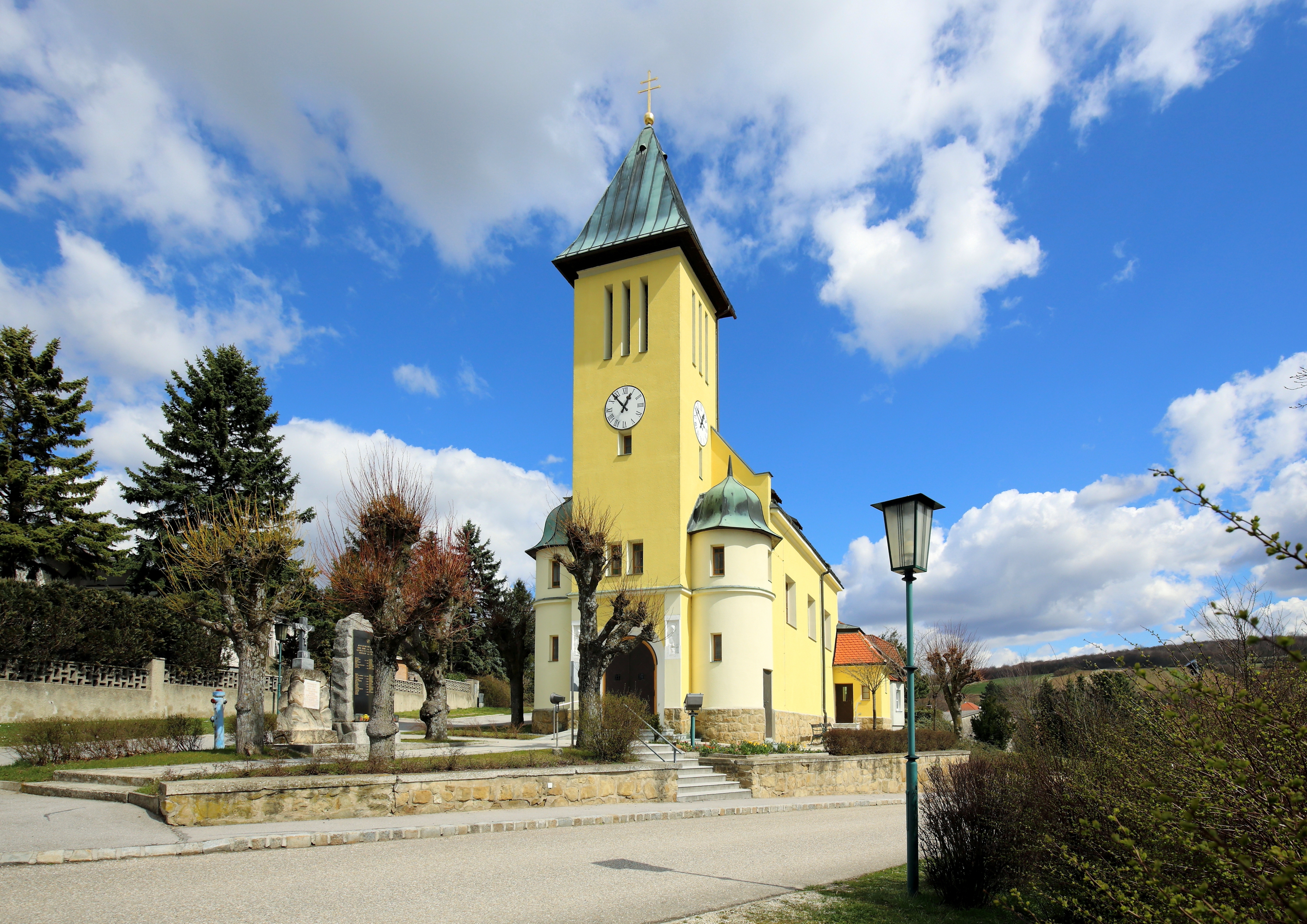 Südwestansicht der katholischen Filialkirche hl. Dreifaltigkeit in Kleinrötz, ein Ortsteil der niederösterreichischen Marktgemeinde Harmannsdorf. Die Kirche wurde 1907 errichtet, 1927 renoviert und von 1968 bis 1971 umgebaut.